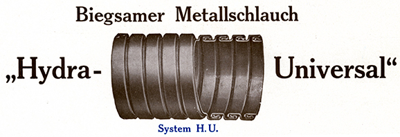 frühe technische Zeichnung eines Wickelschlauchprofiles